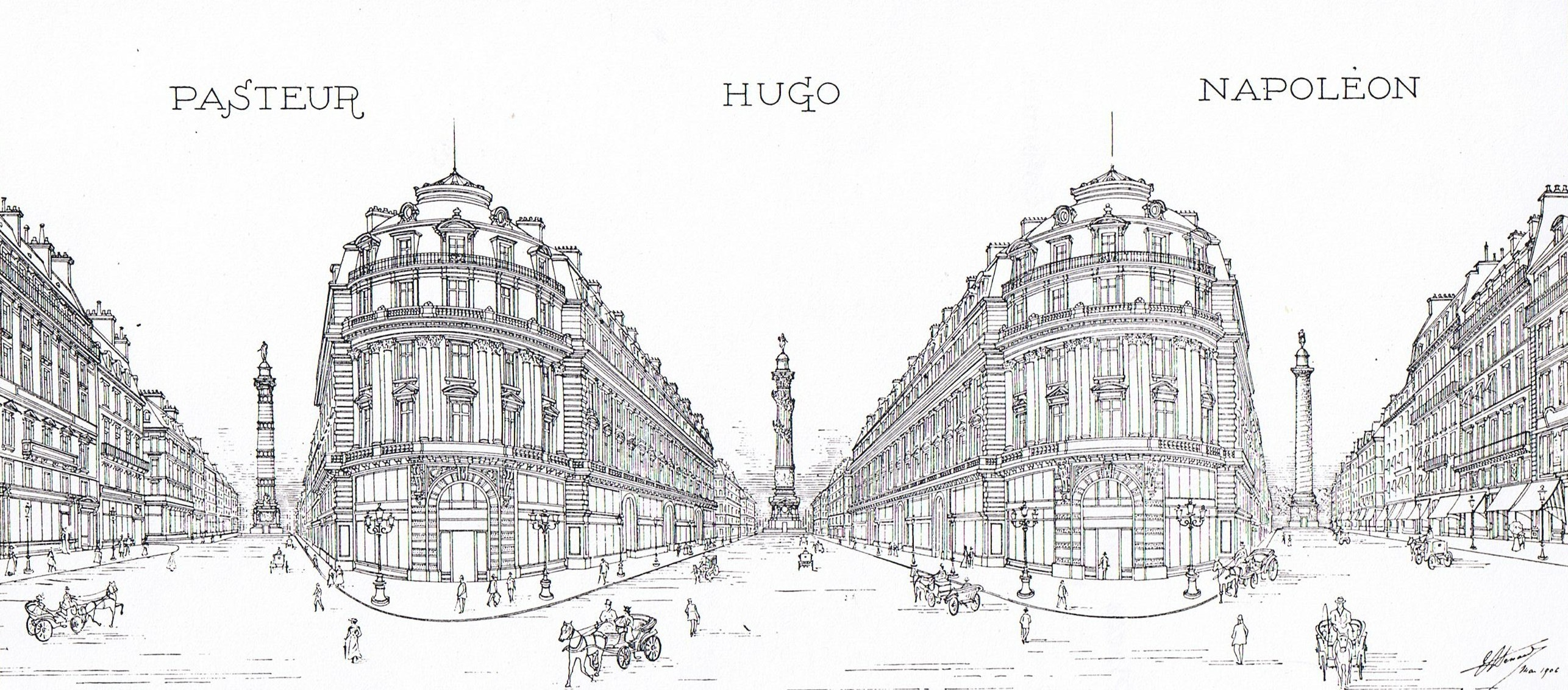 Dessin d'un projet pour la création de deux colonnes à Paris.